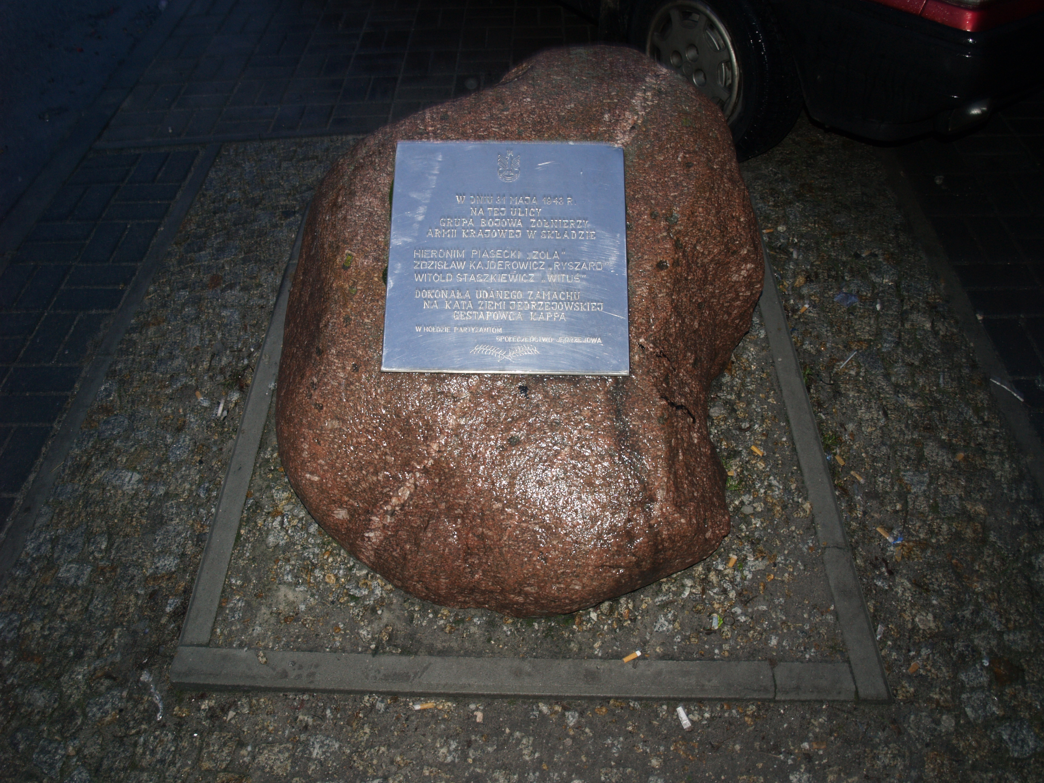 Obelisk_w_Jędrzejowie